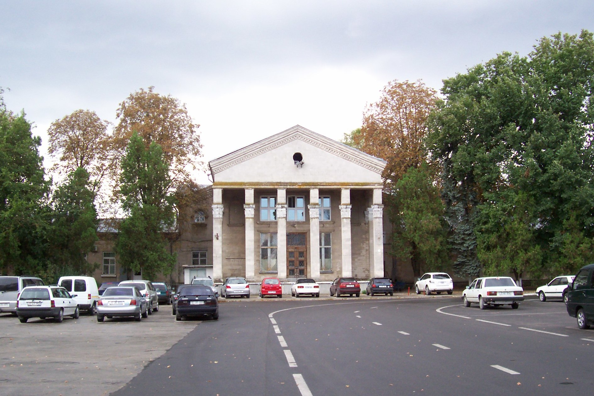 Общий план старого аэропорта Кишинёва (ныне - часть грузового терминала)